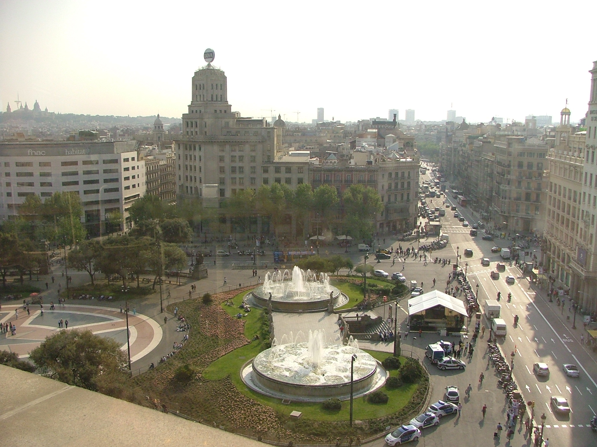 Plaça Catalunya from Corte Ingles